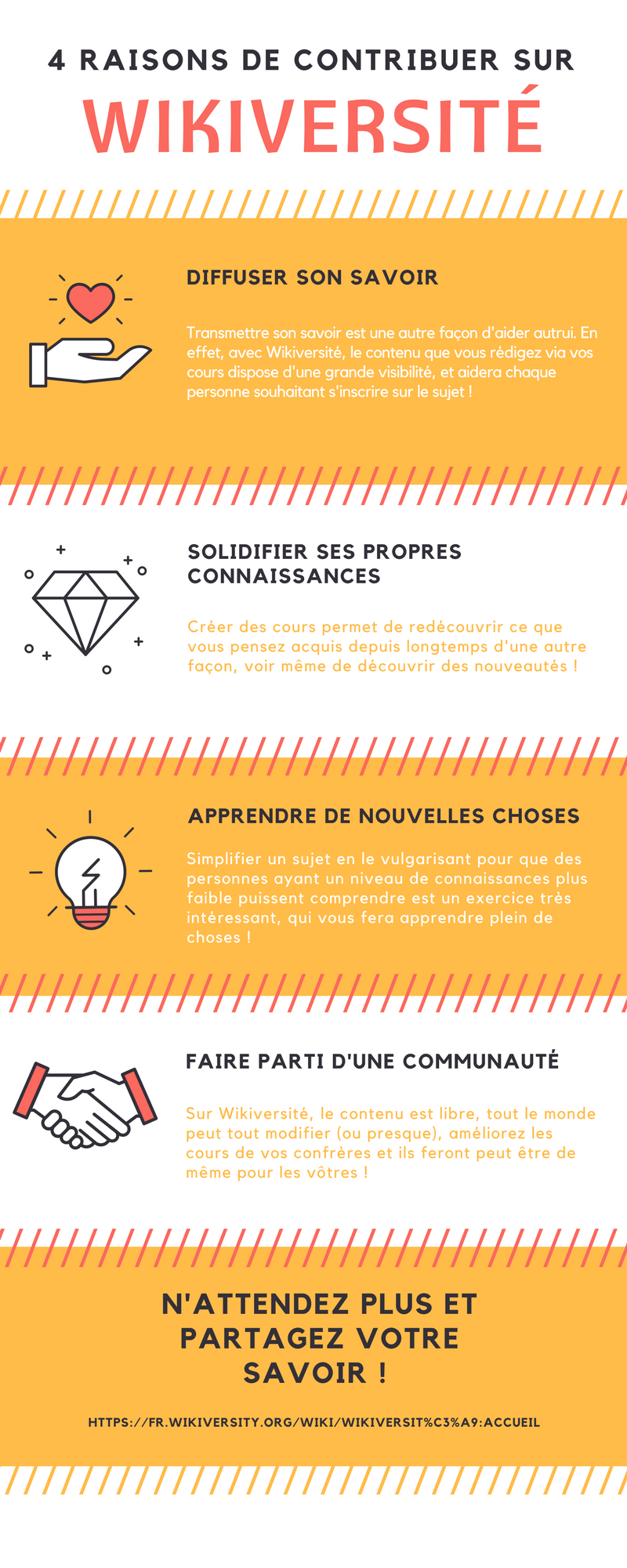 infographie wikiversité à destination des professeurs